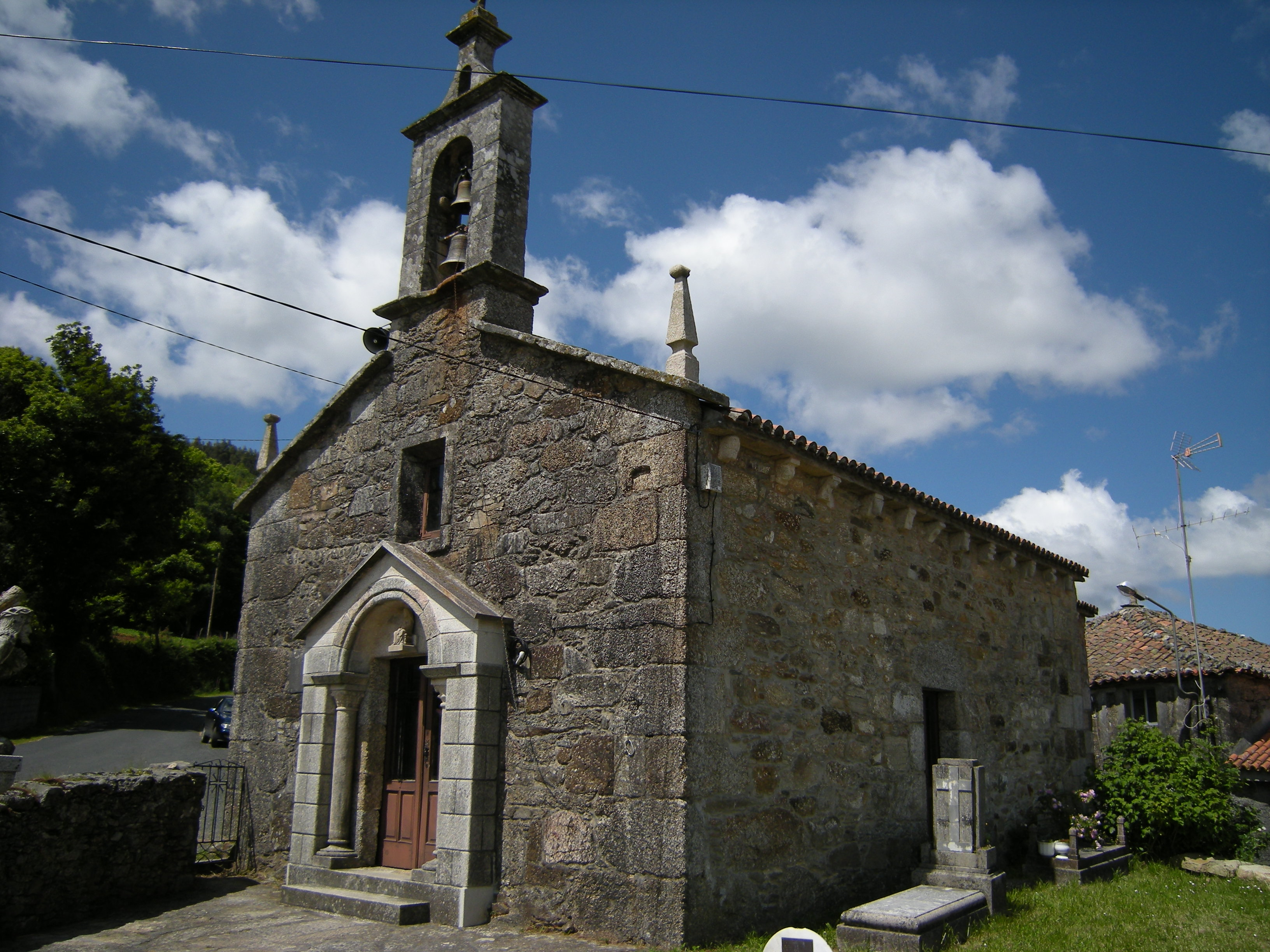 Igrexa parroquial de Santa Eufemia do Monte, Toques